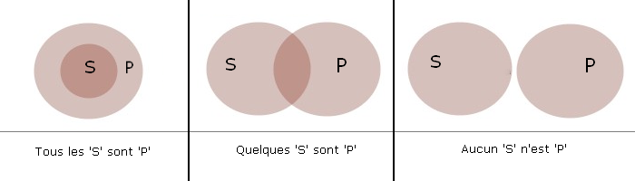 Les trois diagrammes d'Euler pour deux termes